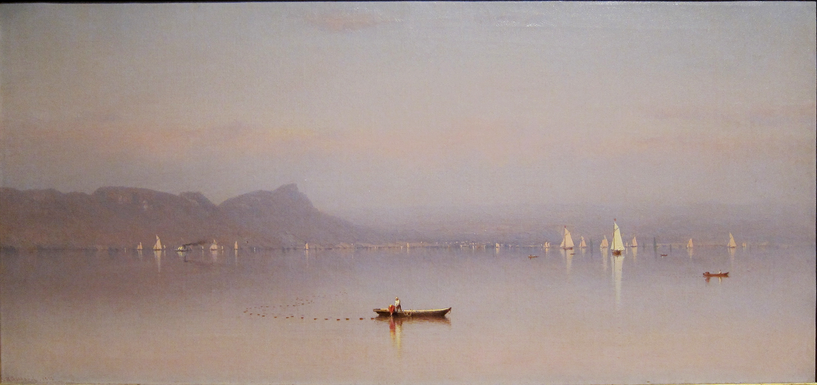 Morning in the Hudson, Haverstraw Bay à l'Art Institute of Chicago.